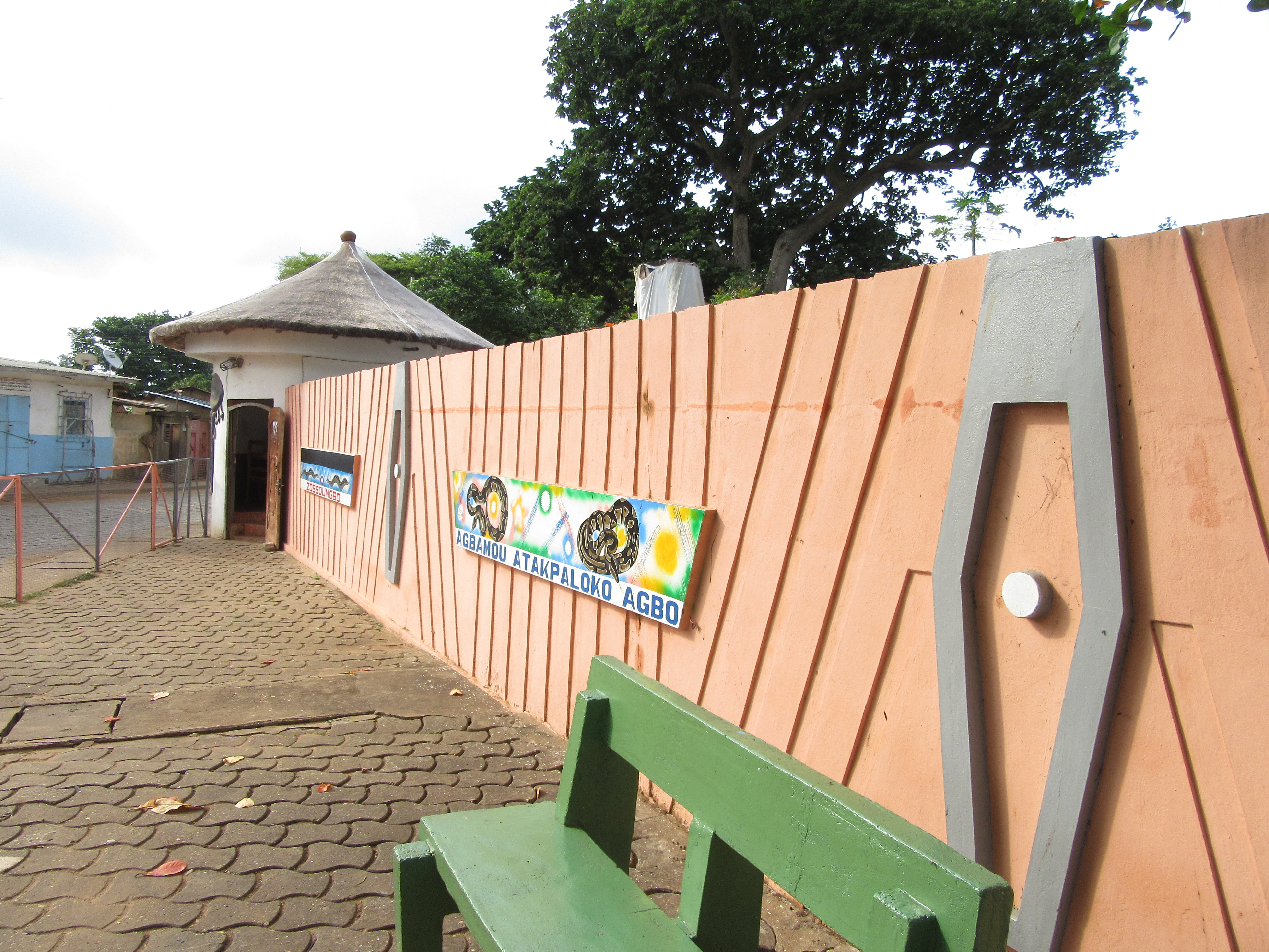 Temple des Pythons Le temple de Dangbé est consacré au culte du python dont des dizaines de spécimens se prélassent dans l'une des petites cases. Si vous voulez avoir un python autour du cou, le guide se fera un plaisir de vous le passer, moyennant un petit billet. Sinon il vous parlera du python, dieu vaudou vénéré jusqu'à Grand-Popo, où sa représentation orne de nombreux temples. A Ouidah, les familles xweda et fon qui pratiquent le culte du python Dangbè (dit aussi Dan) se distinguent par des scarifications symbolisant les marques frontales du python. Wikidata has entry Q36698317 with data related to this item.